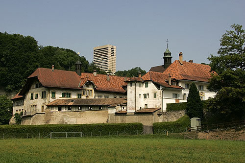 Fribourg / Freiburg: Couvent de la Maigrauge